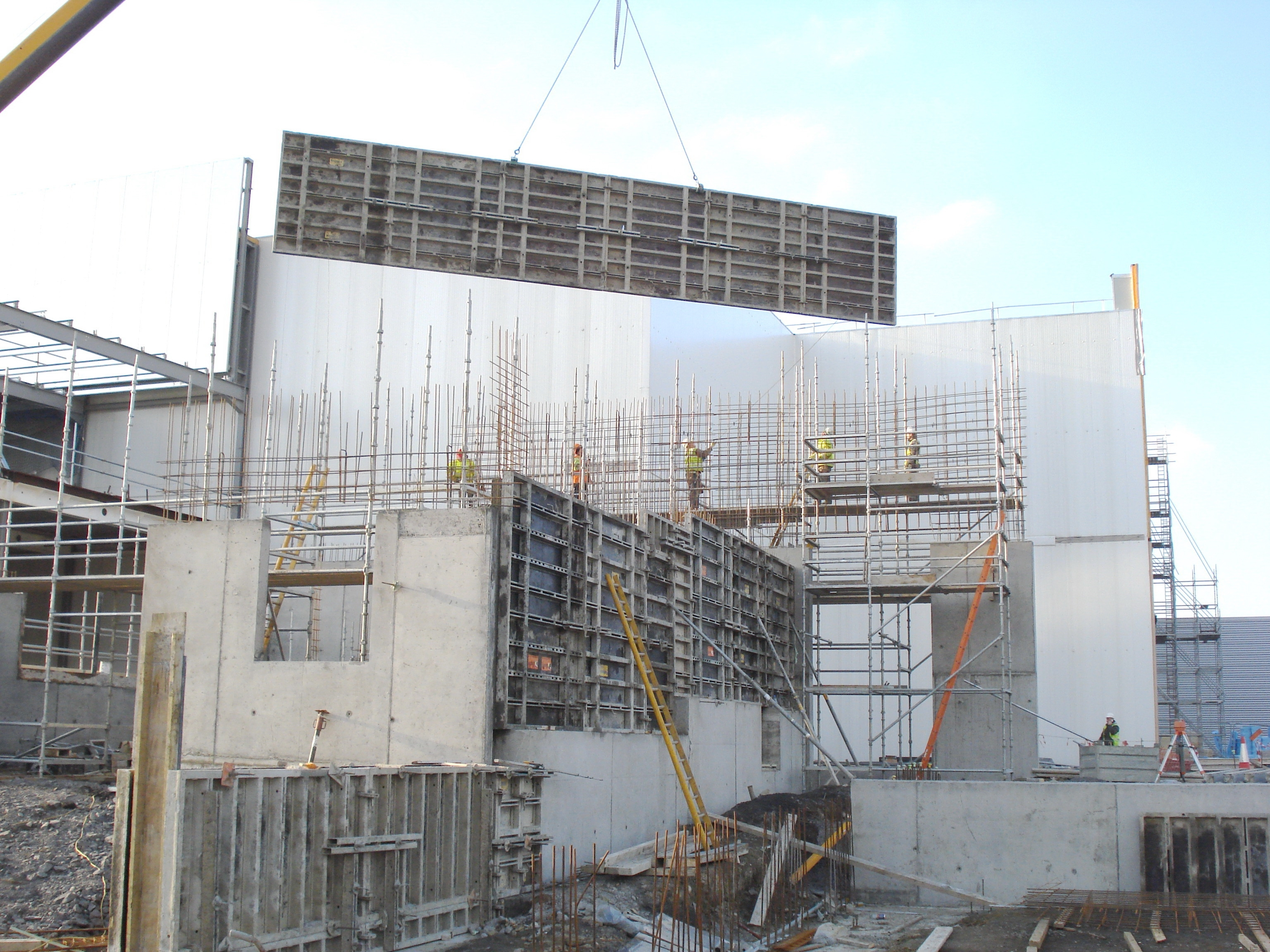 Costruzione palazzo in Romania